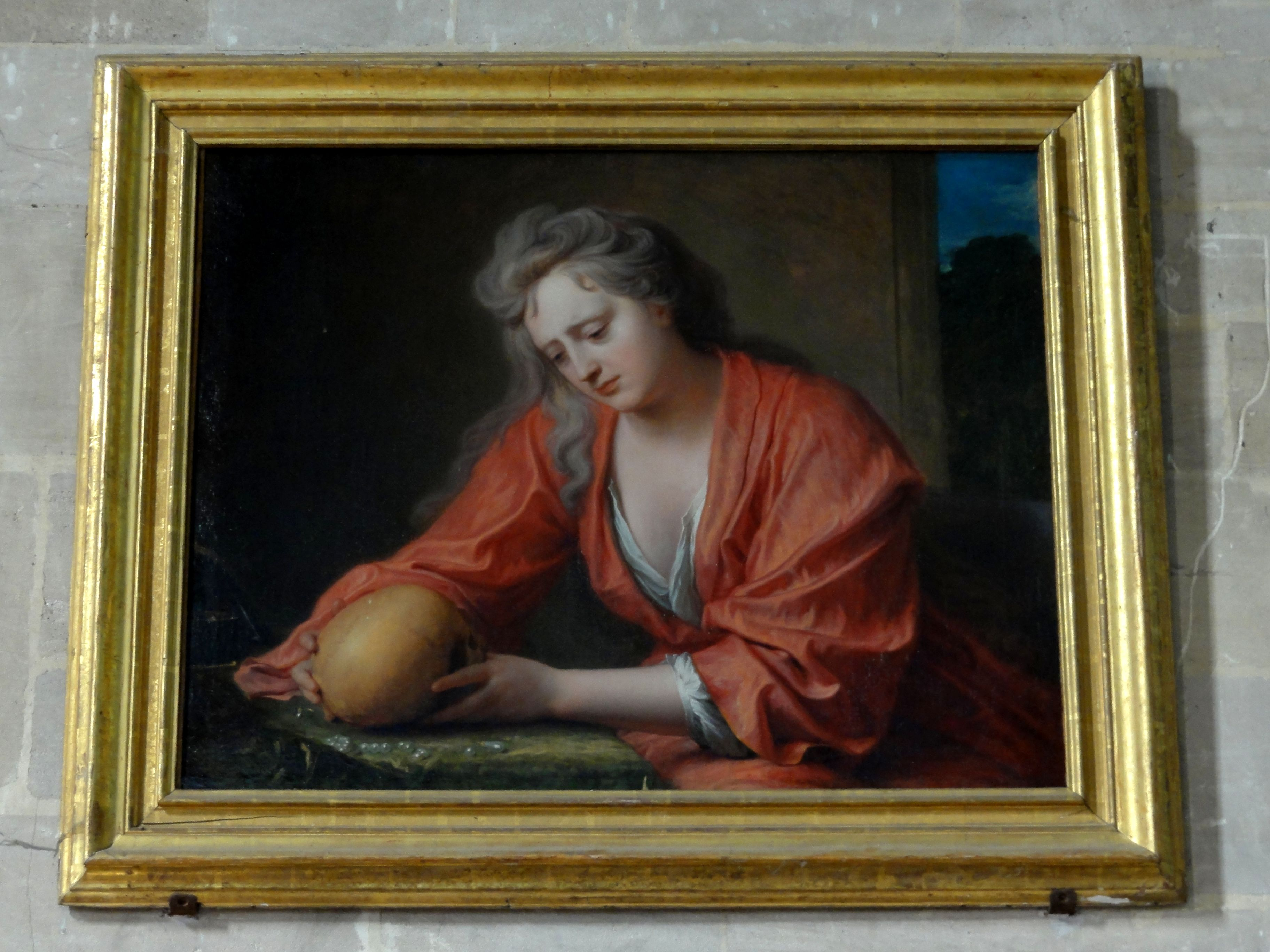 Tableau : Sainte Madeleine repentante.